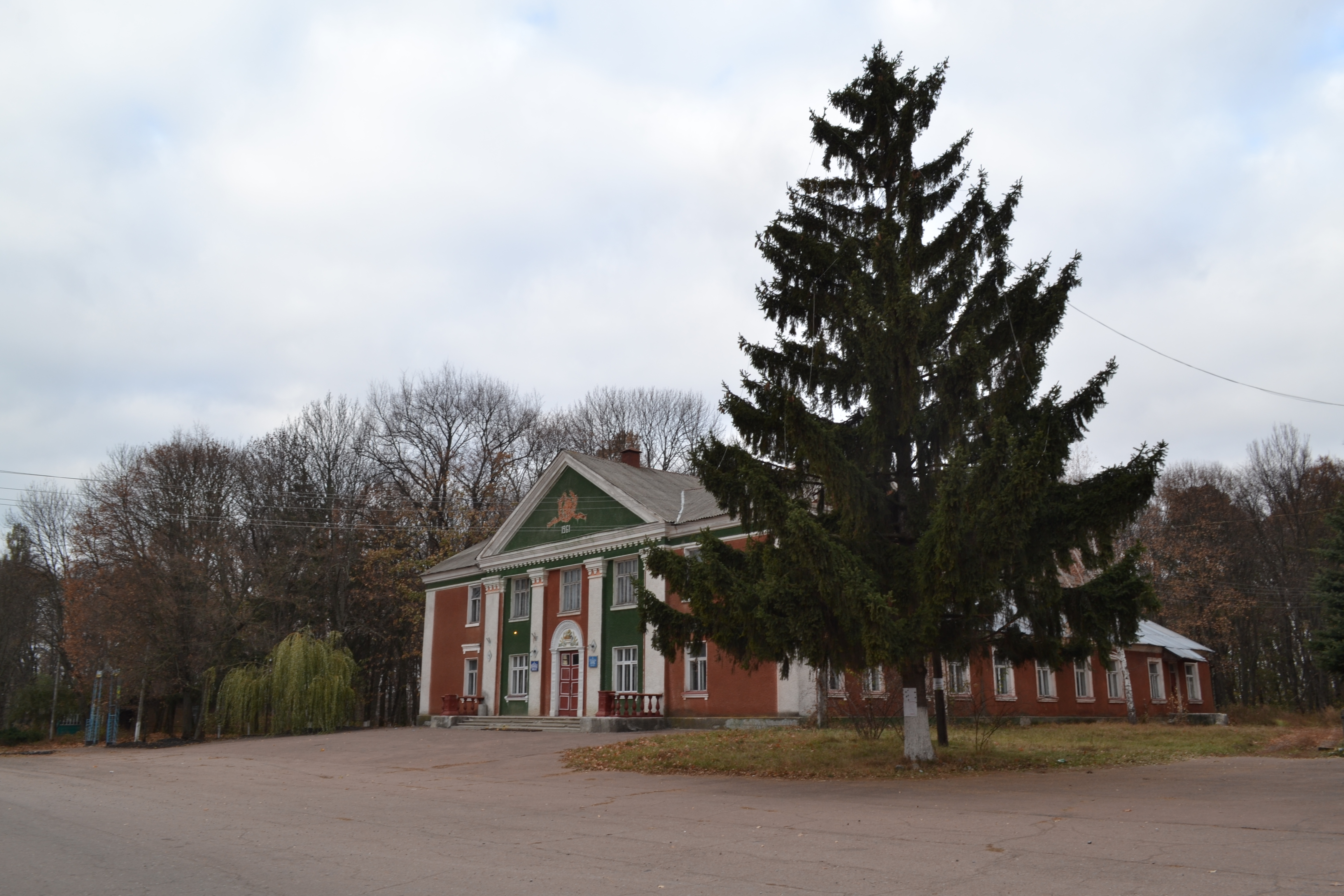 с. Стольне, Менський район, Чернігівська область